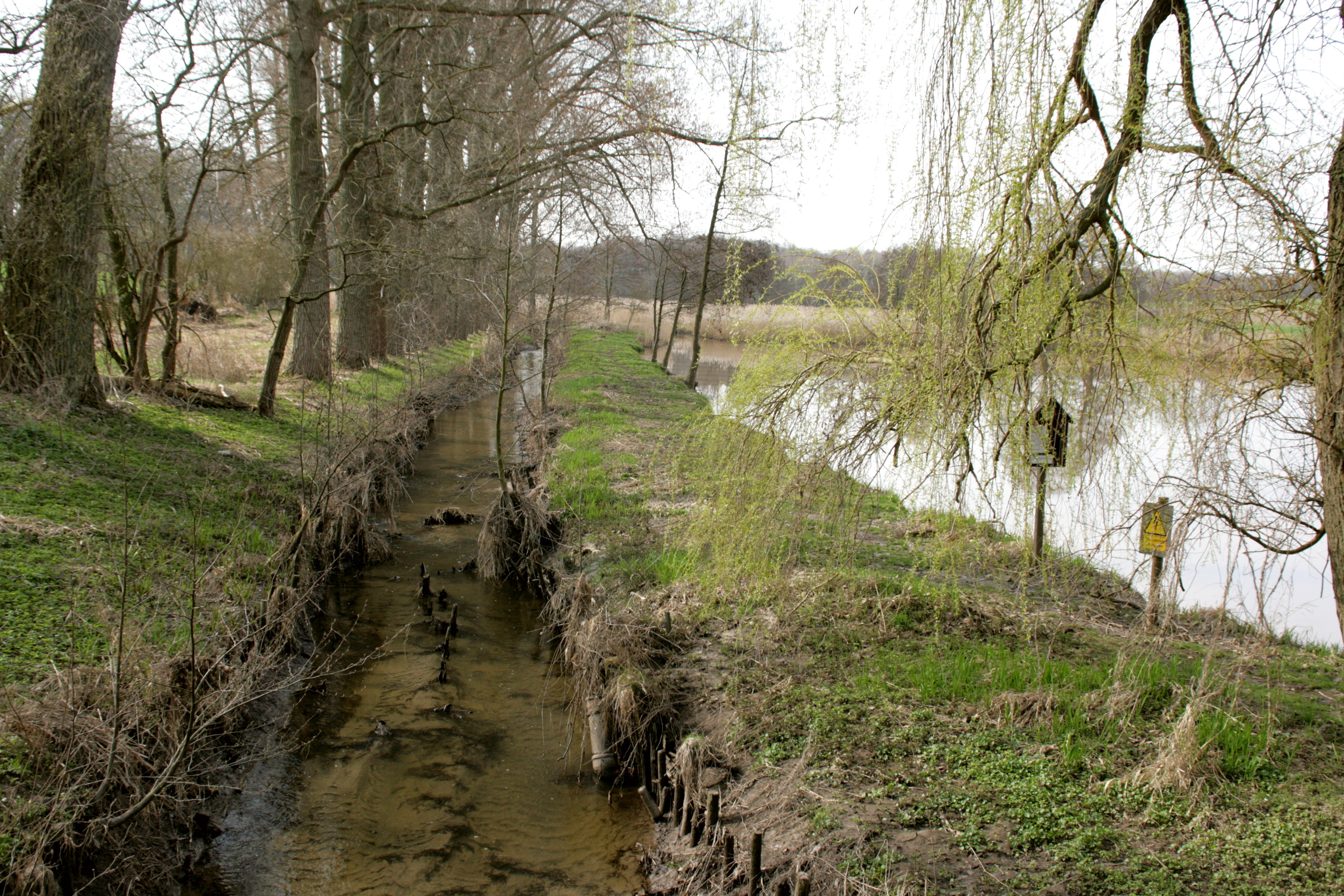 Barumer Mühlenbach mit Mühlenteich vor der Rockenmühle in Addenstorf, Jelmstorf